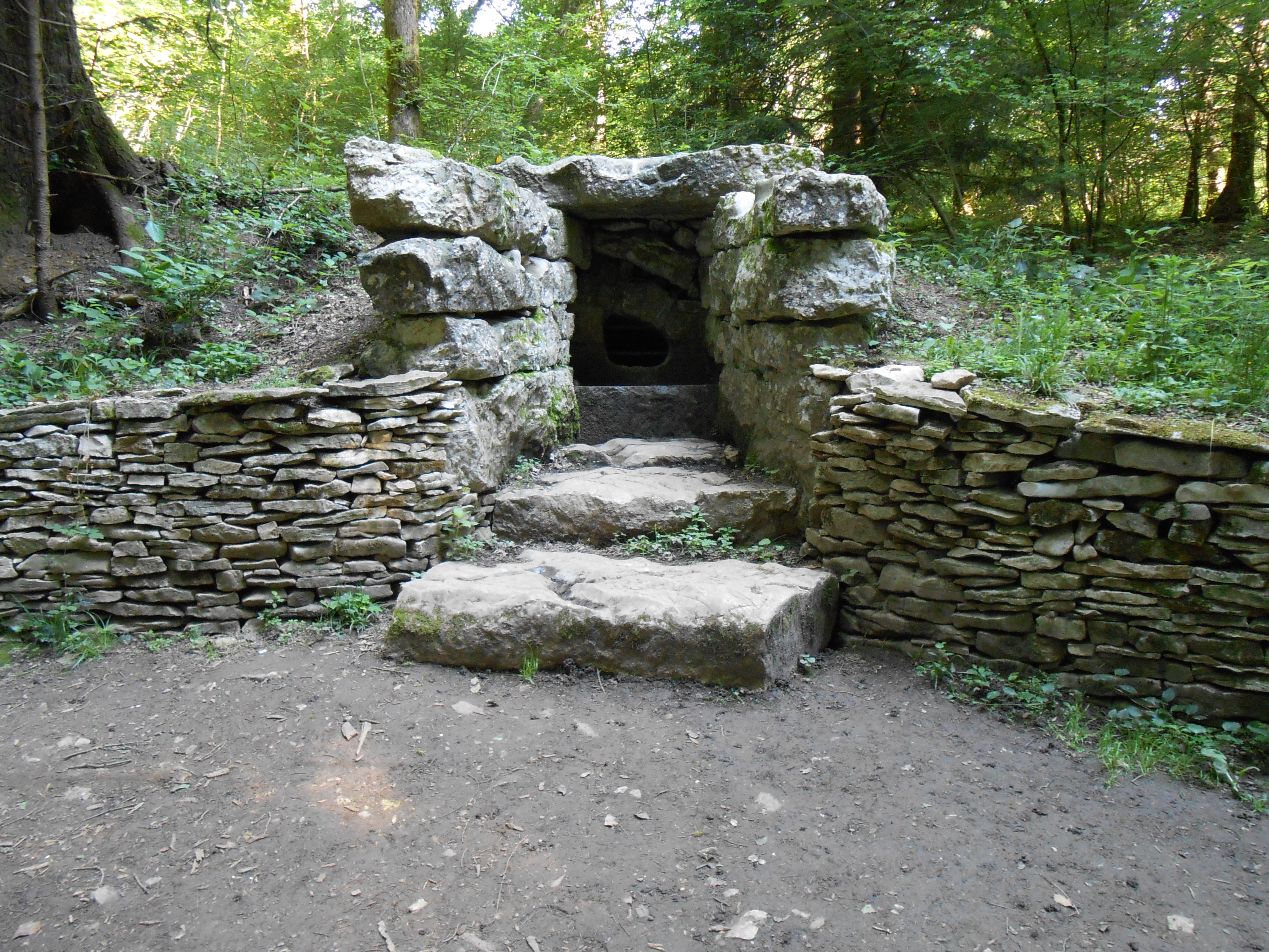 Fontaine au cœur de la forêt de Chailluz